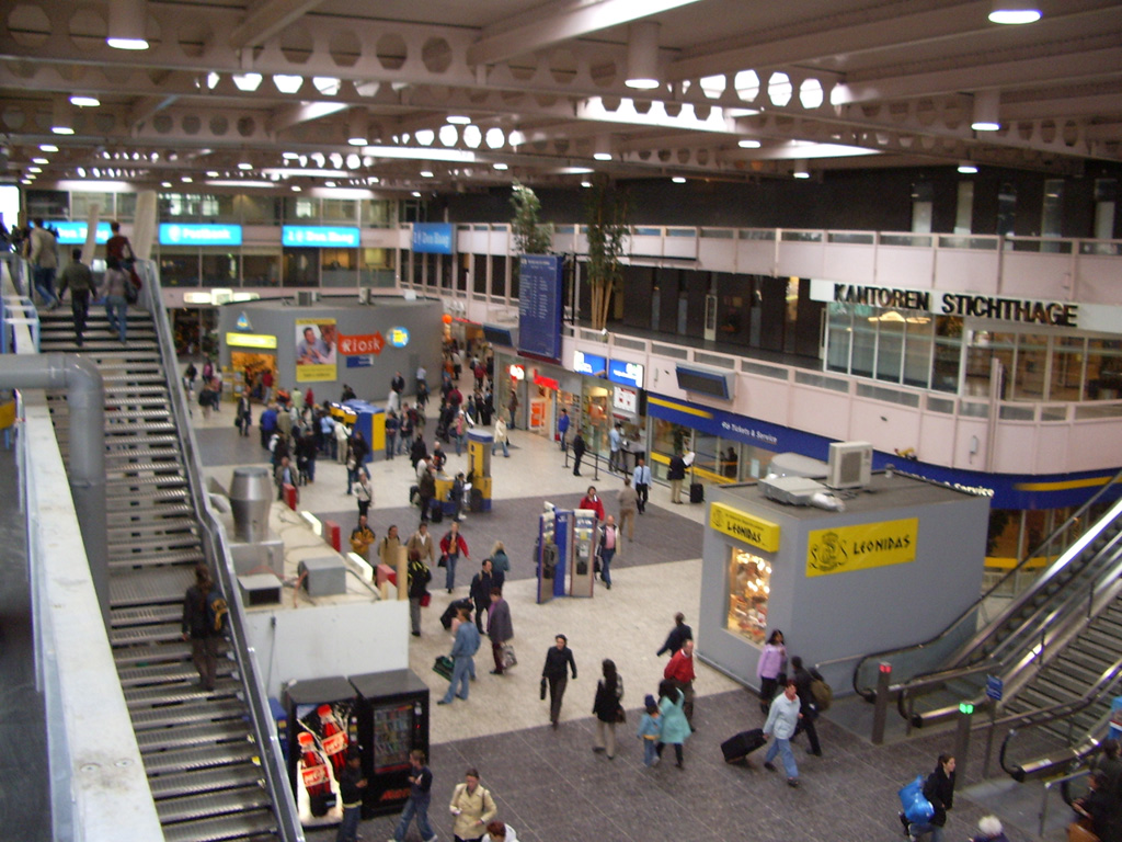 Den Haag Centraal station, stationshal (main hall).